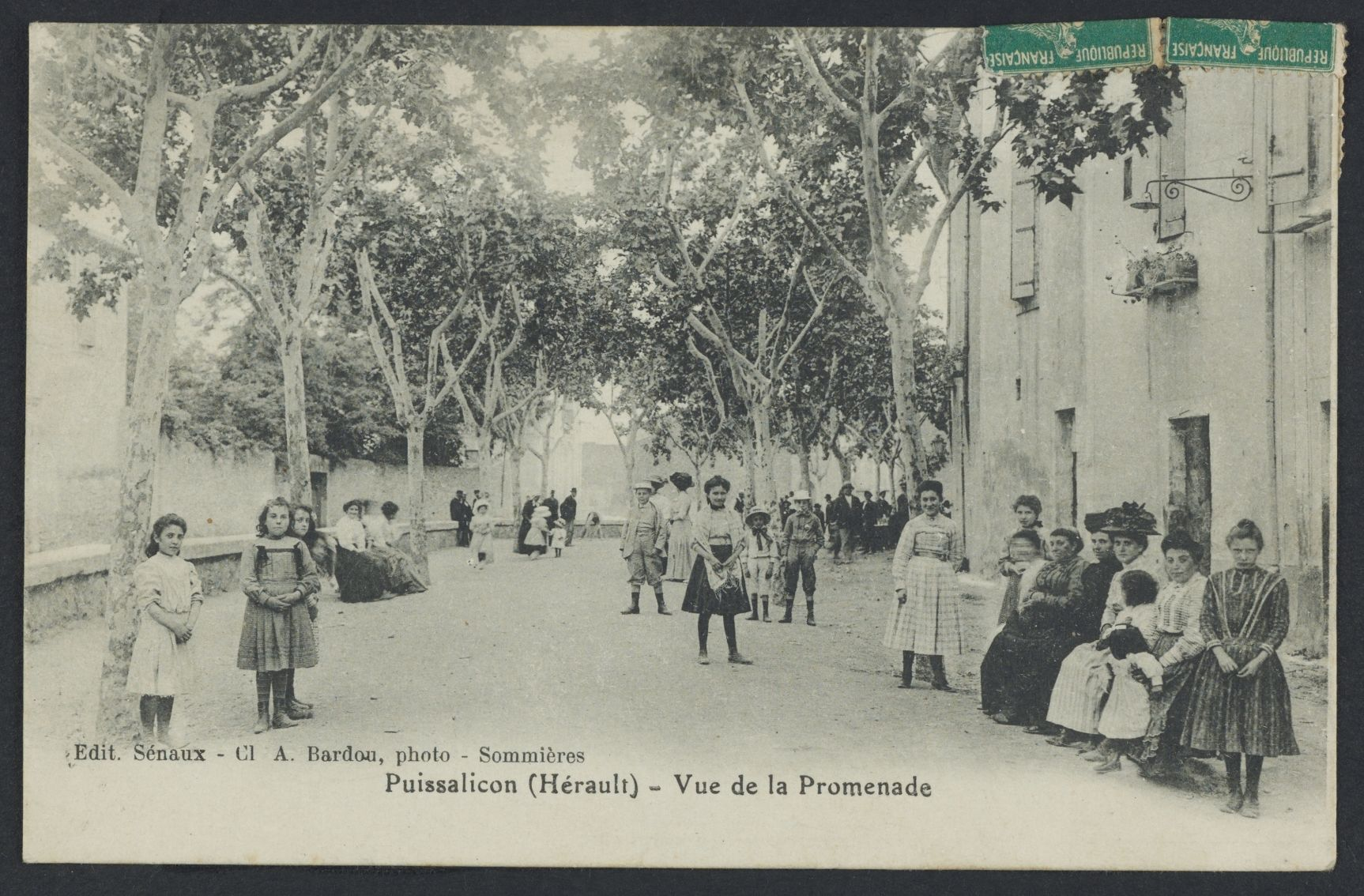 Puissalicon. - Vue de la Promenade : carte postale.